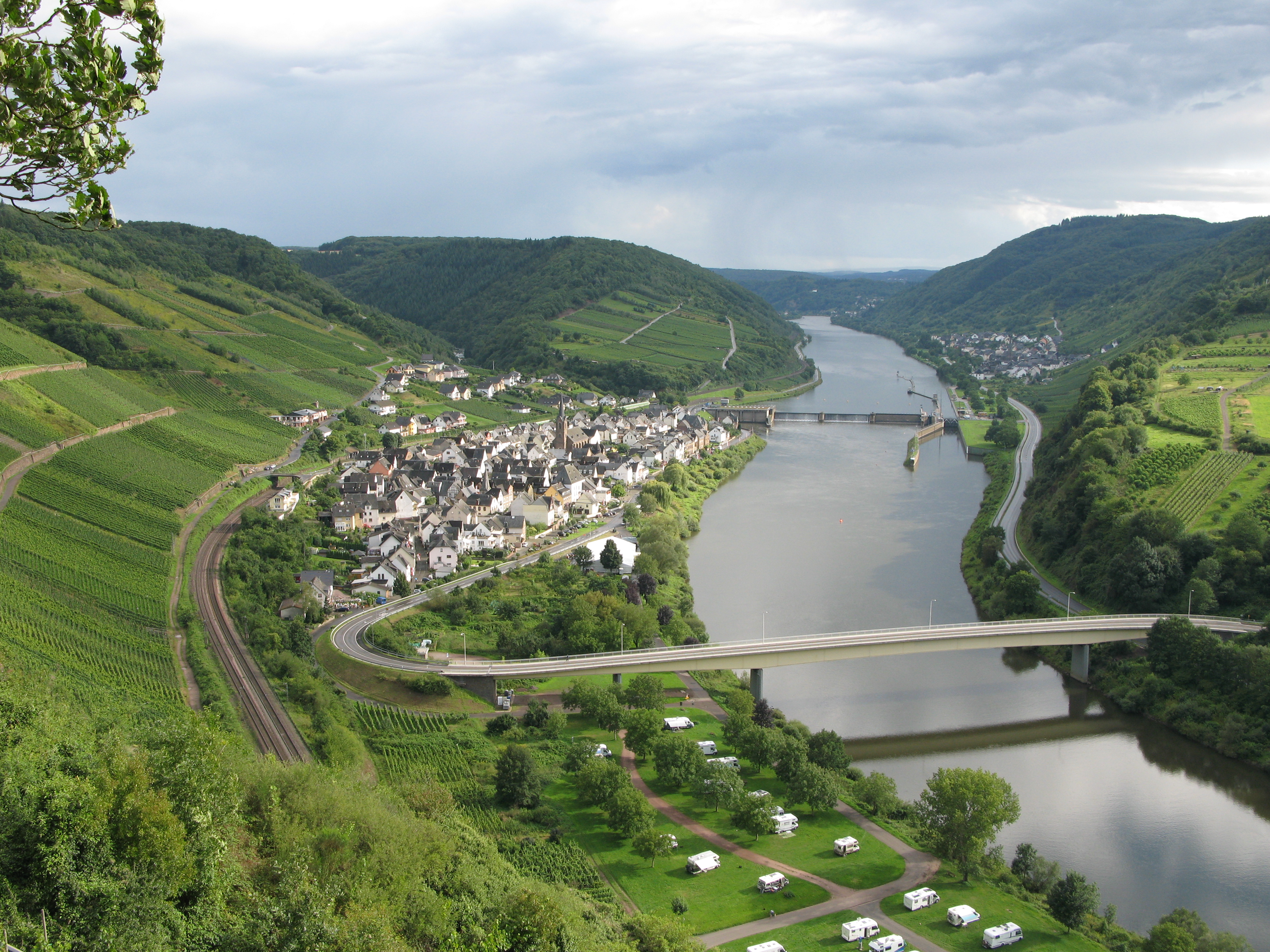 Sicht auf Neef und rechts im Hintergrund auf Sankt Aldegund, gesehen vom Petersberg am Moselsteig.